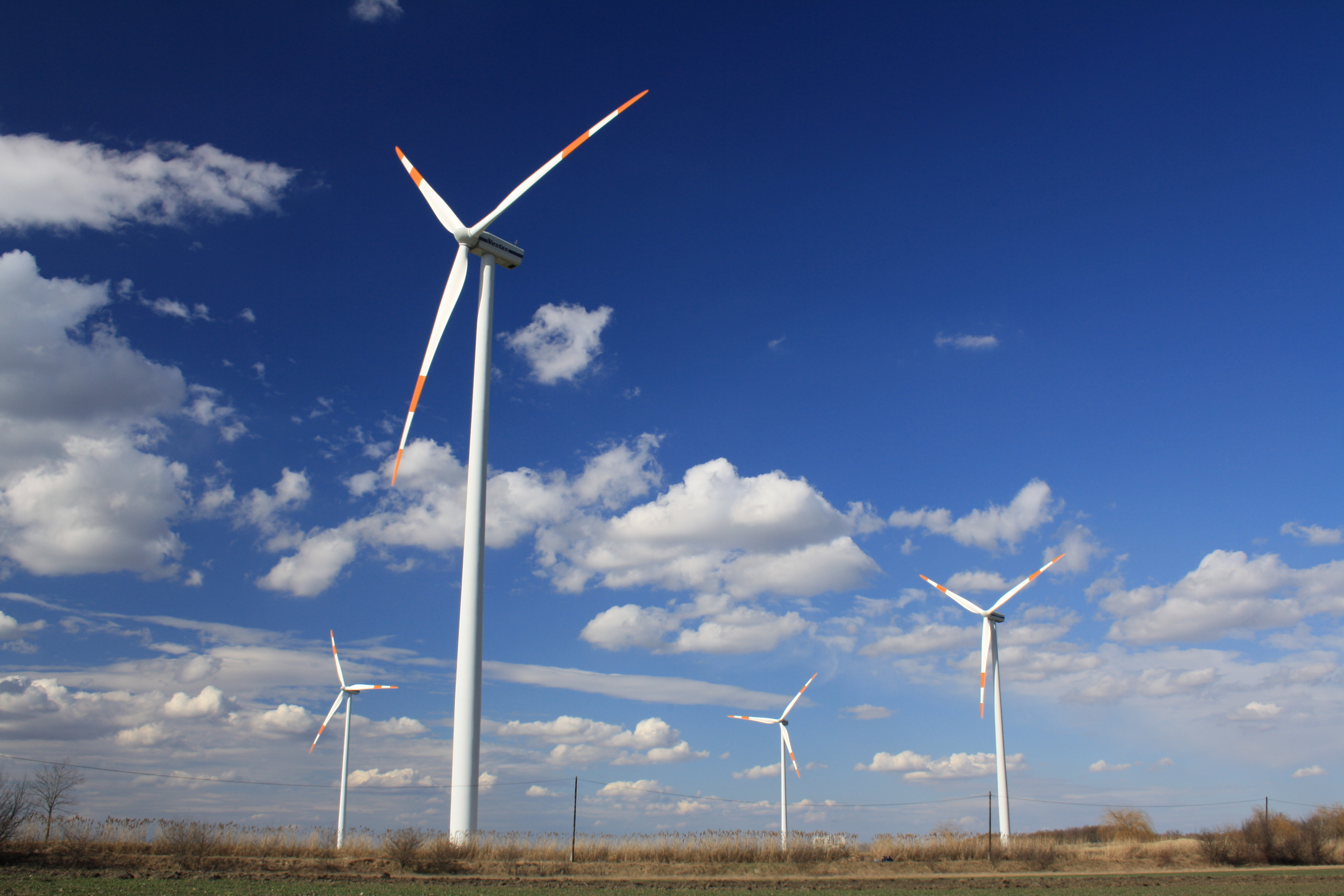 Szélerőmű Mosonmagyaróvár határában (Győr-Moson-Sopron megye, Magyarország)